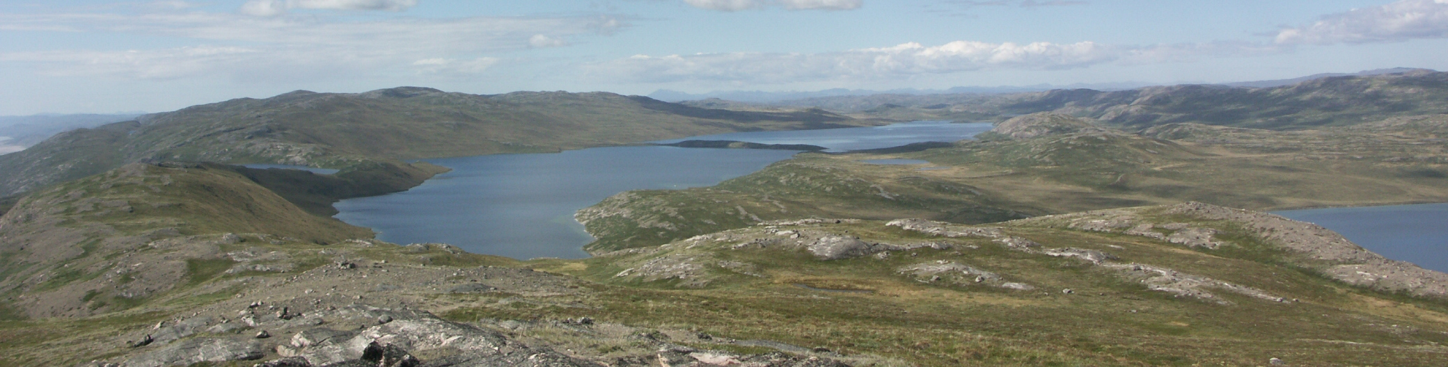 Sanningasoq lake, Qeqqata, Greenland